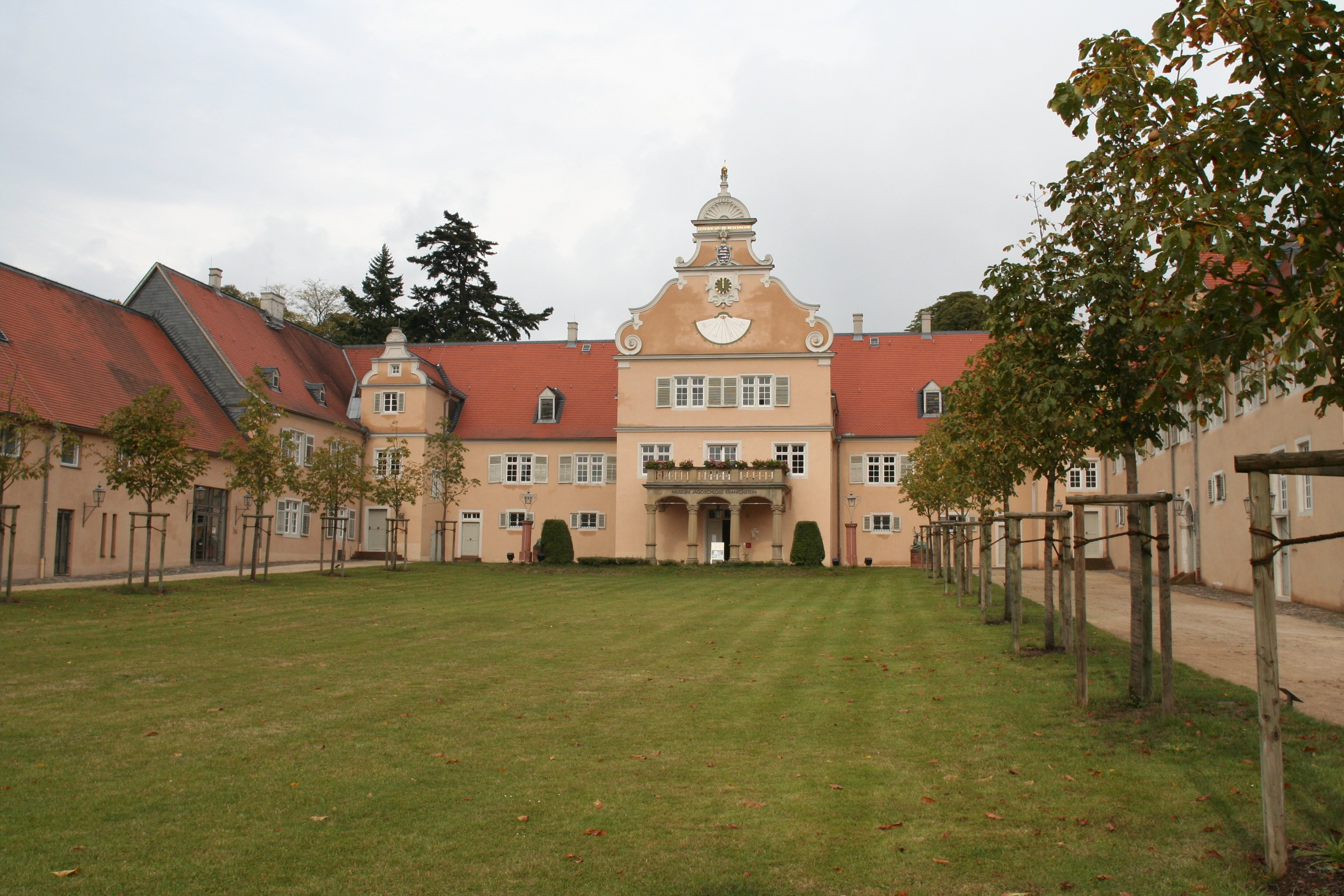 Jagdschloss Kranichstein, Darmstadt (Germany)